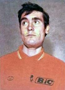 Luis Ocaña (1971), 'Sprint 71', Panini figurina n°61.